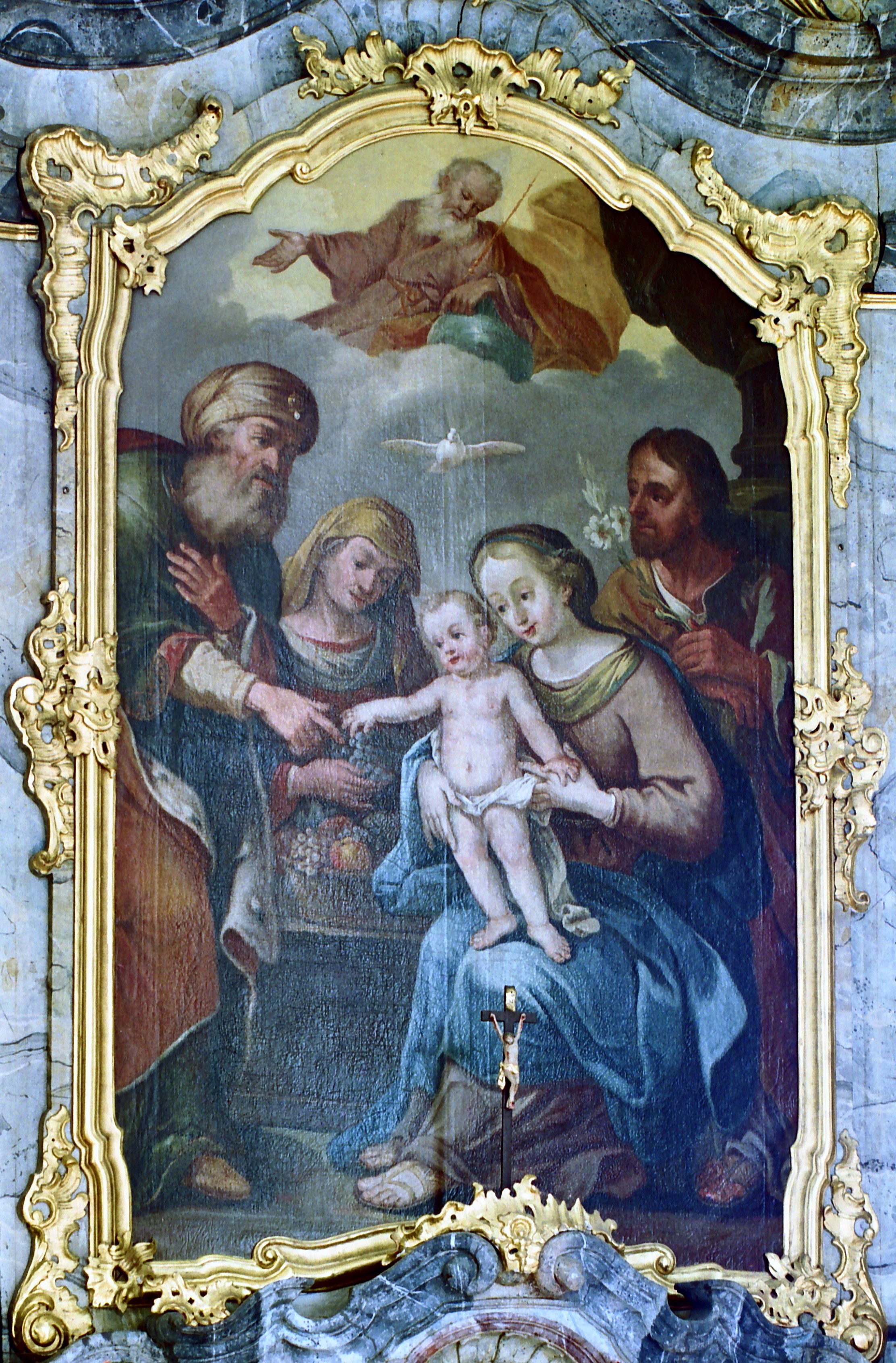 Hl. Sippetitle QS:P1476,de:"Hl. Sippe" label QS:Lde,"Hl. Sippe"